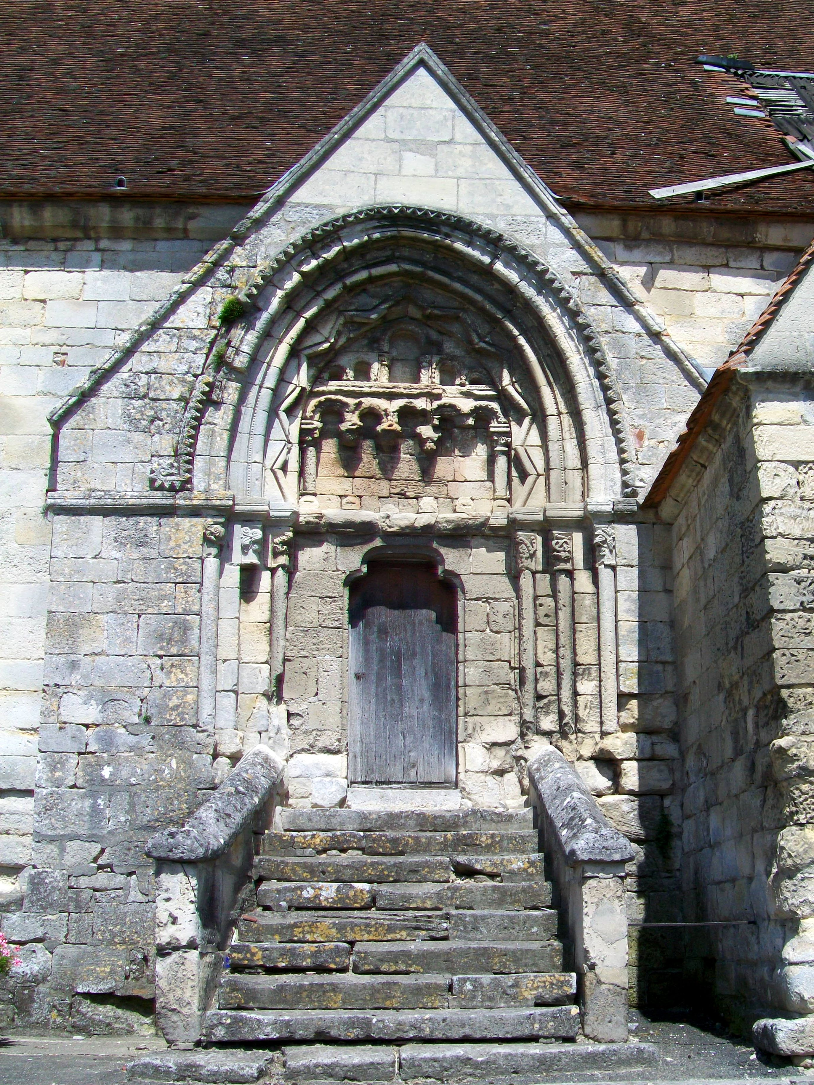 Portail sud de l'église Saint-Vaast.